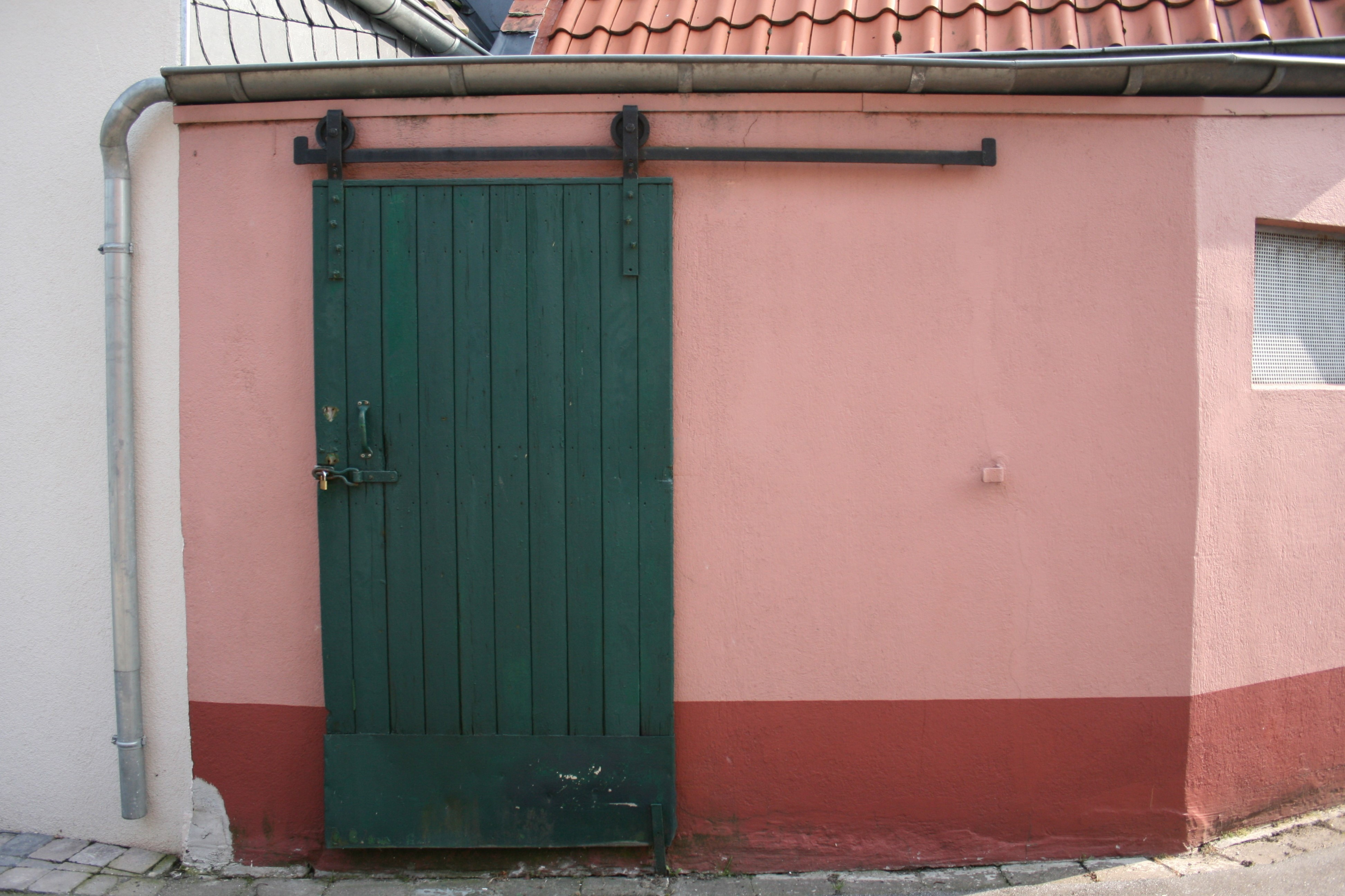 Kalkar-Grieth